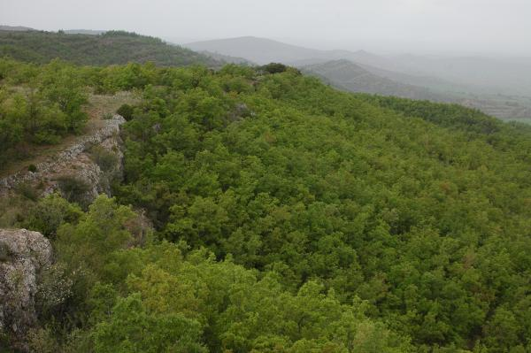 Fotografía Comarca del Jiloca - Rebollar de Bea